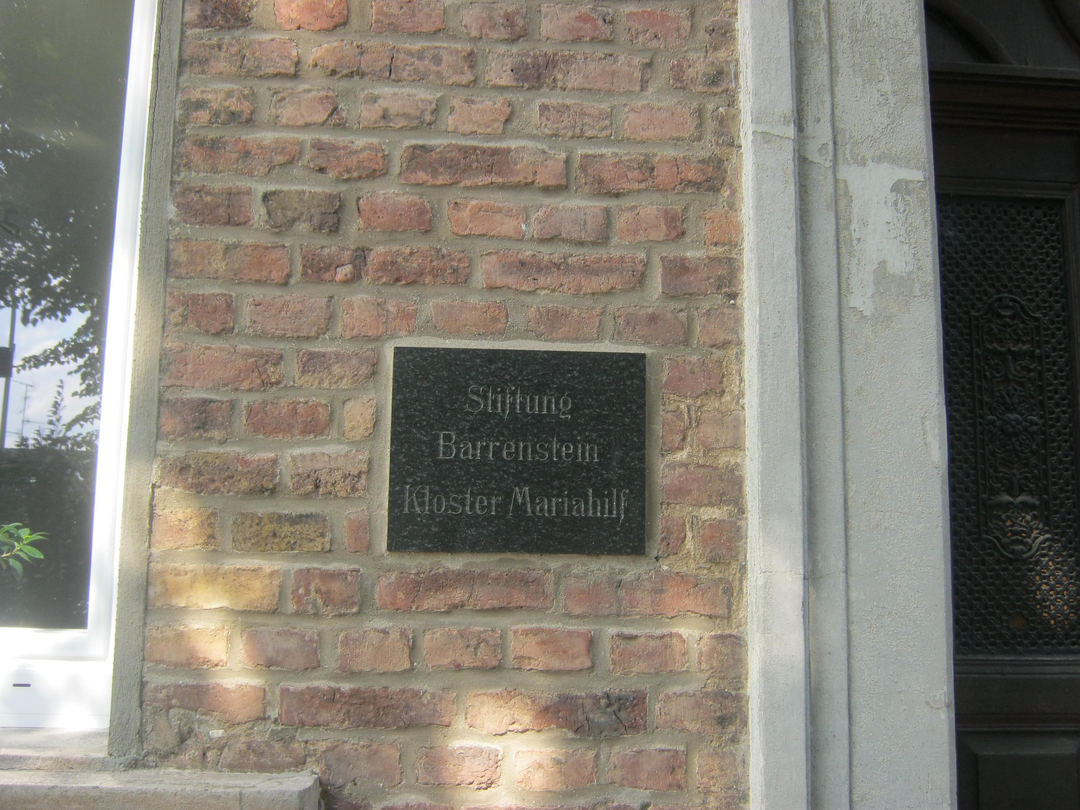 Die Gedenktafel